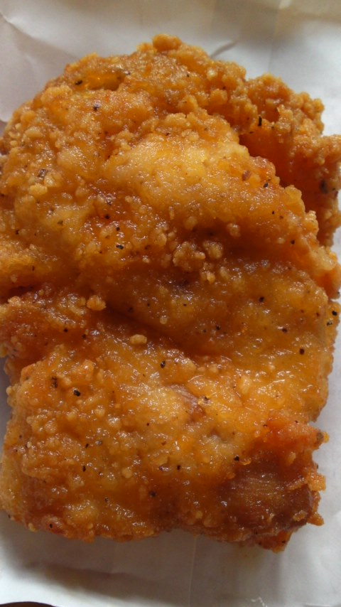 Lチキノーマル味